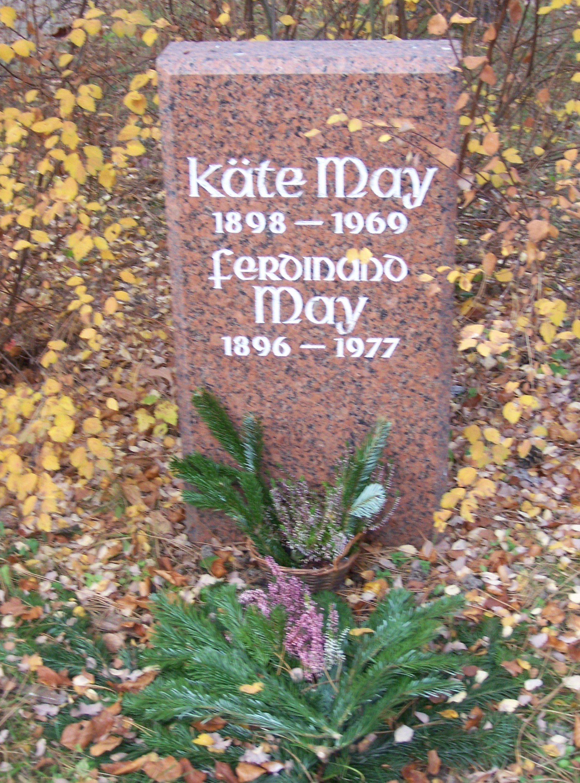 Grabstätte Käte und Ferdinand May auf dem Südfriedhof in Leipzig